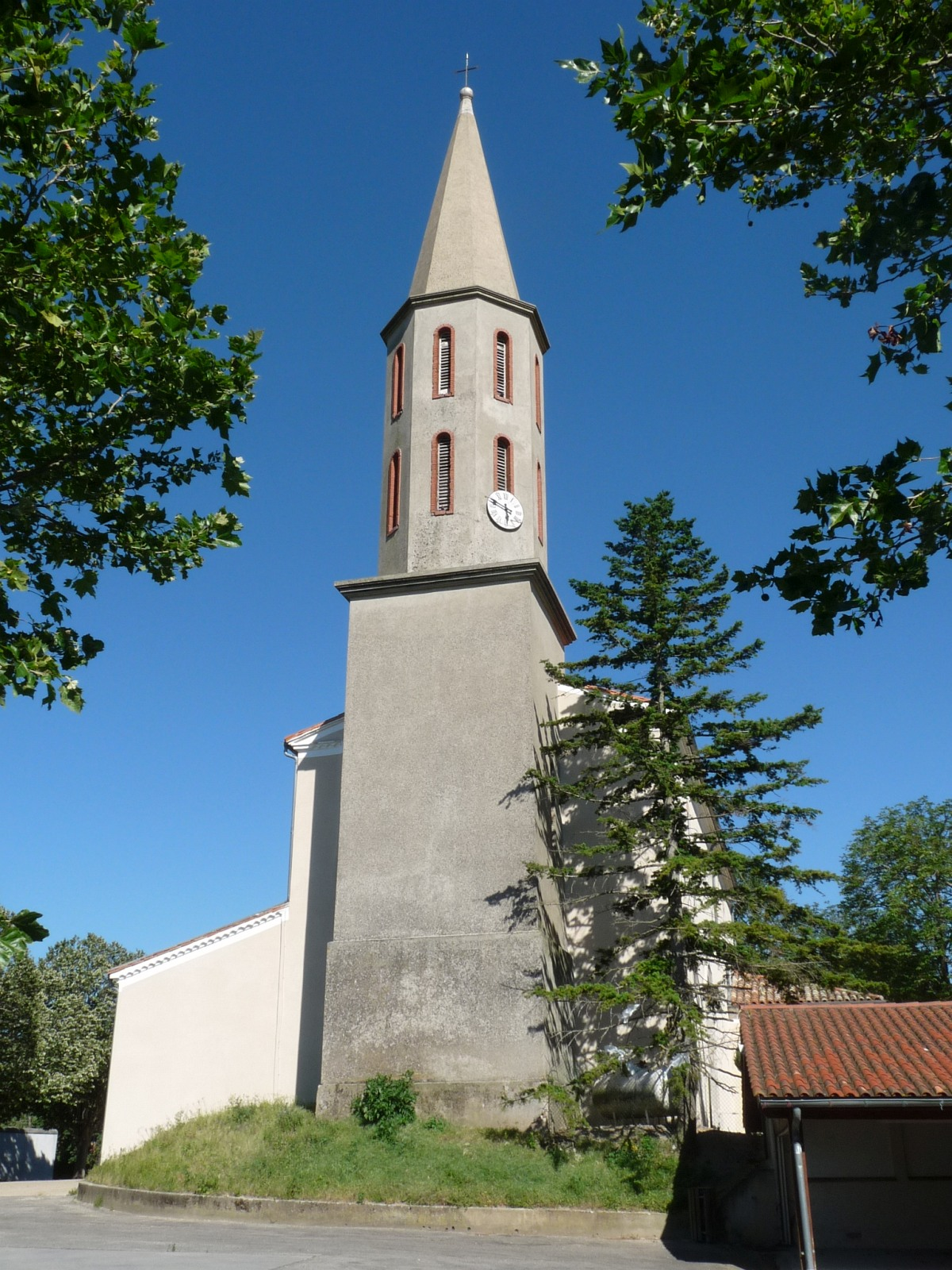 Eglise Saint-Saturnin de Dreuilhe, Revel, Haute-Garonne, France